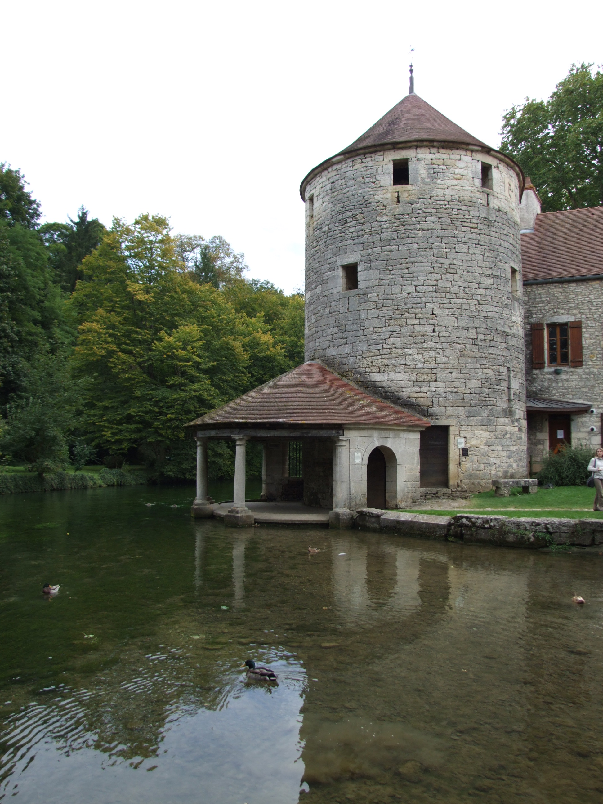 Bèze, Côte d'Or, Bourgogne, FRANCE